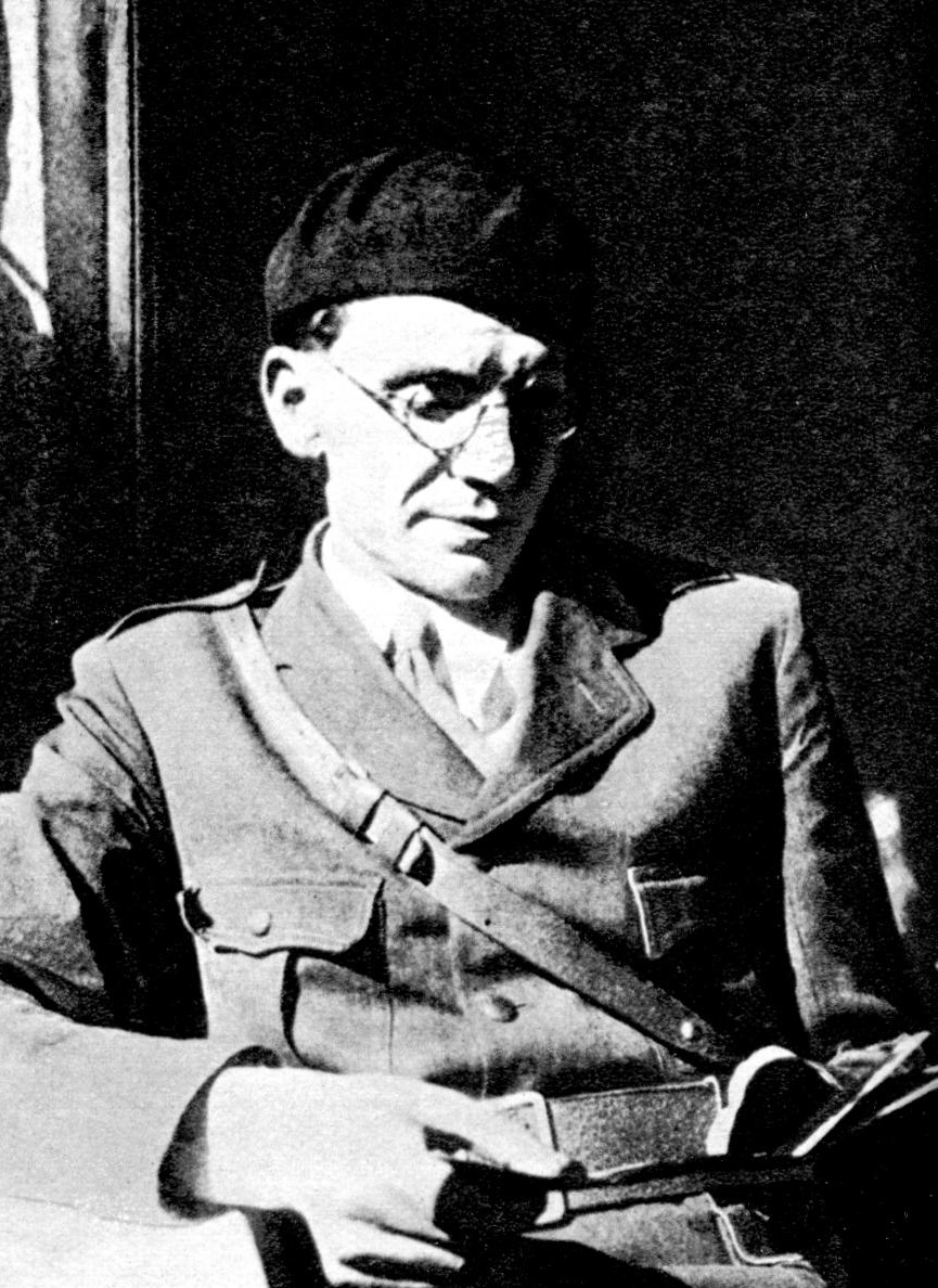 Karlo Mrazović u Španiji